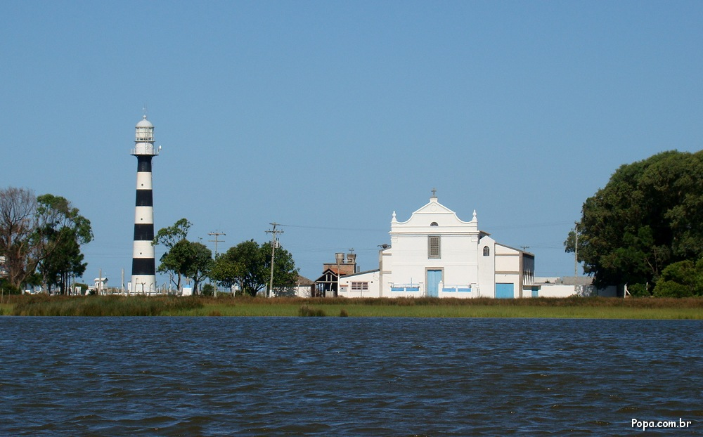 lighthouse